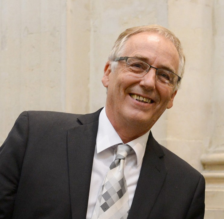 Guy Pujolle en 2016 à Paris